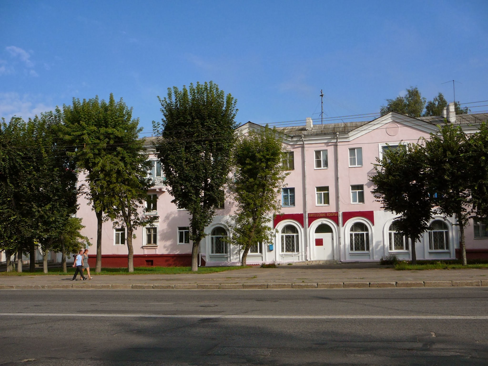 Кiрава, Магілёў, Belarus